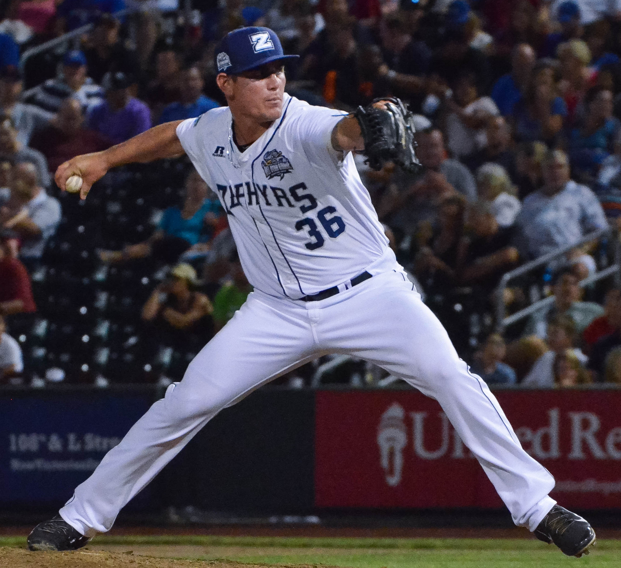 Nick Wittgren